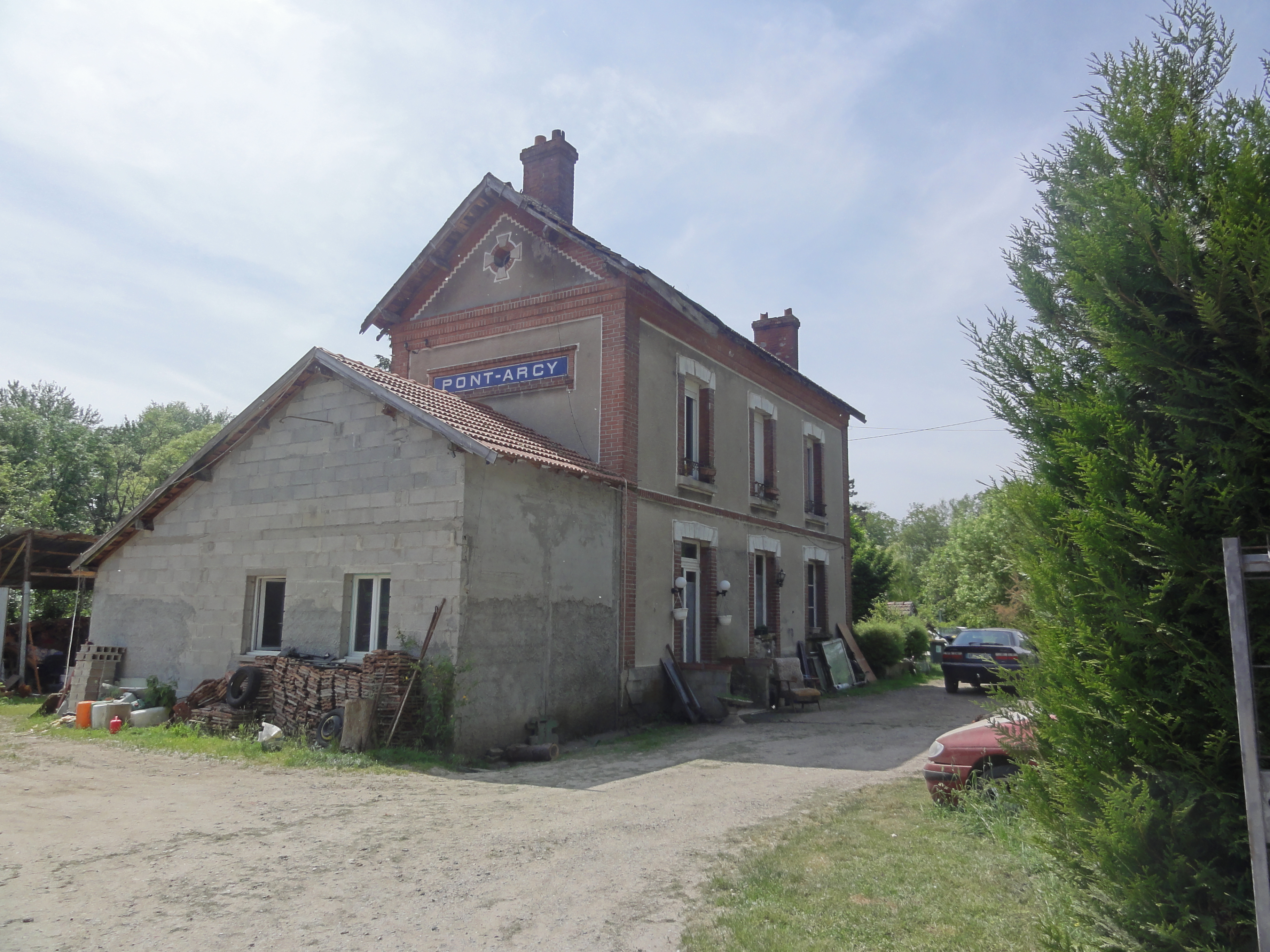 Pont-Arcy (Aisne) ancienne gare sur la ligne Soissons - Cormicy - Guignicourt des Chemins de fer de la Banlieue de Reims (CBR)